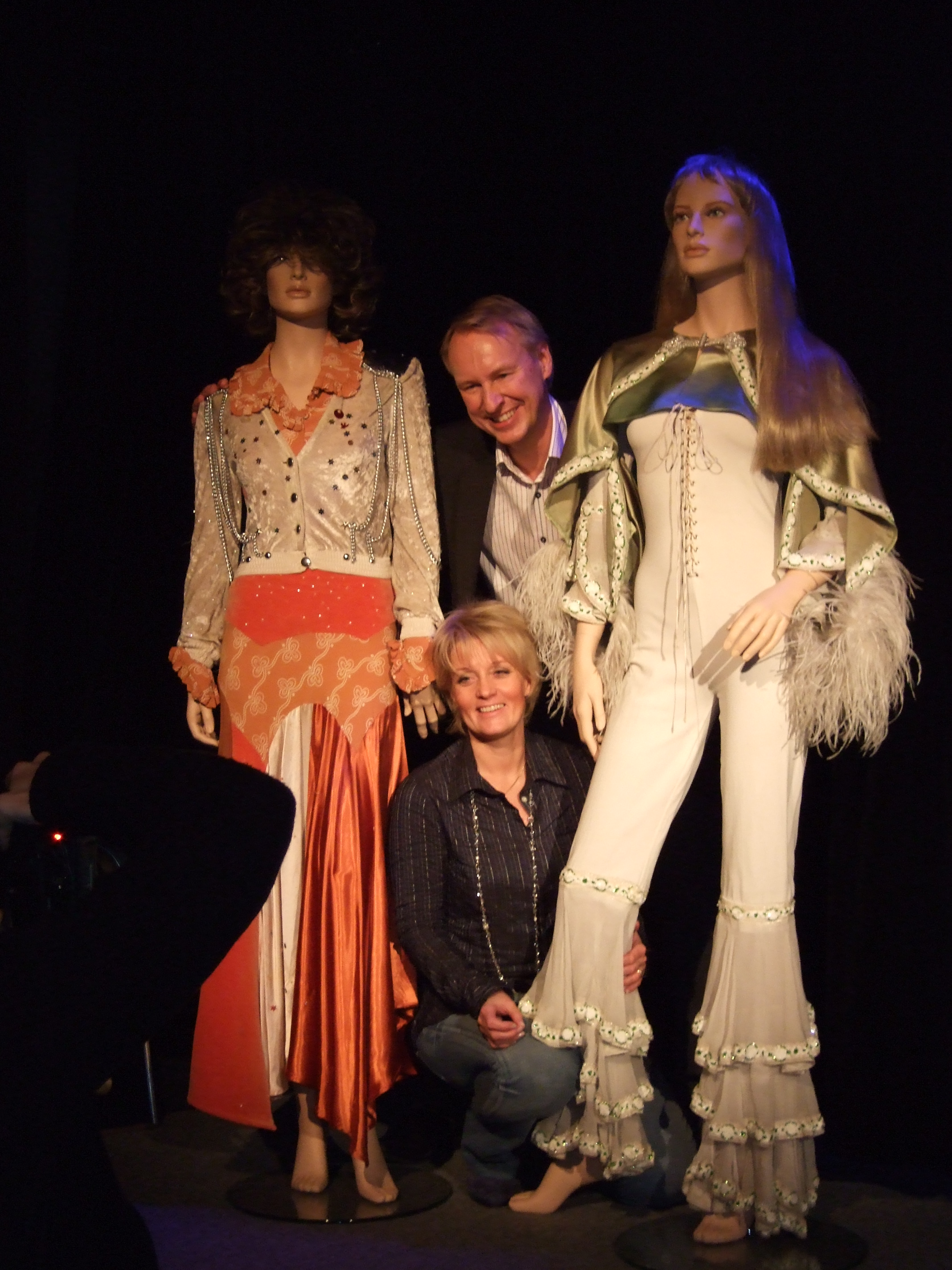 Presskonferens 28 nov 2006 då planerna på ett ABBA museum i Stockholm lanserades av Ewa & Ulf. Anni-Frids original Waterloo-kläder och Agnethas original kläder till Mamma Mia-videon.